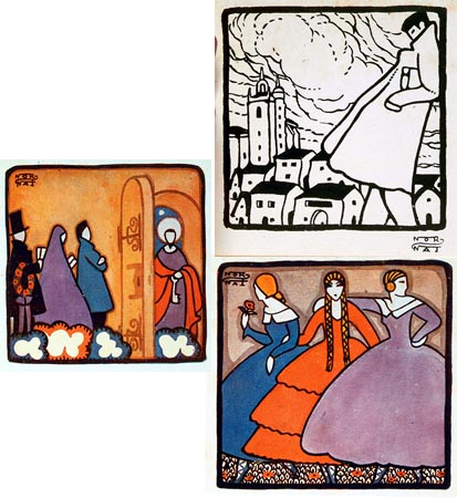 Ignacia Zabaloren (Nor_Nai) ilustrazioak, Irungo jaietako programa, 1925.